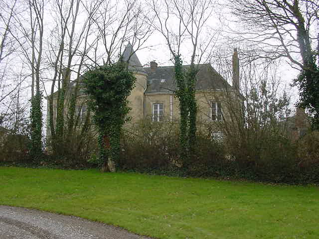 20010304_Maison du prêtre vue de derrière.JPG